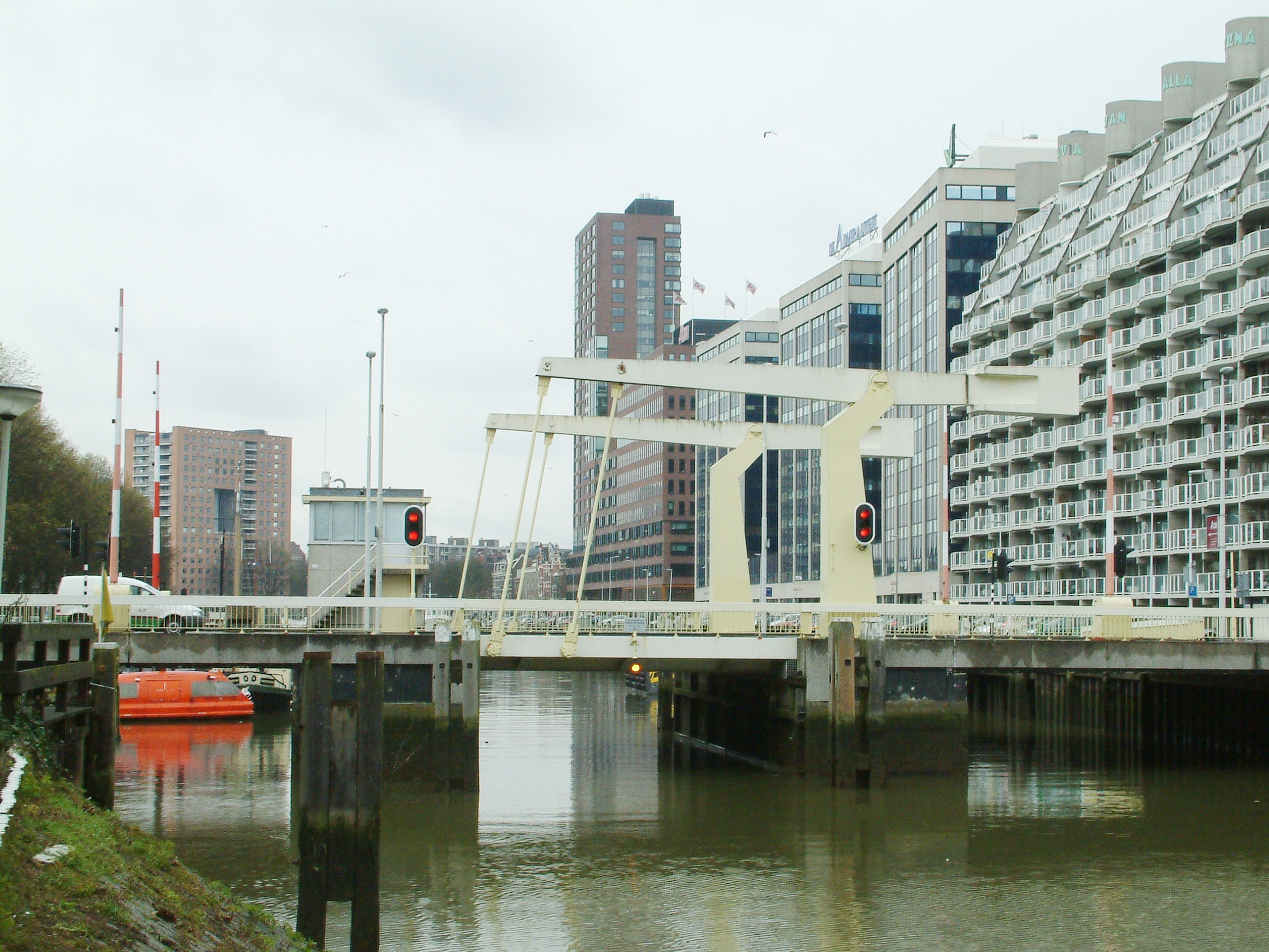 Admiraliteitsbrug over het Buizengat in Rotterdam